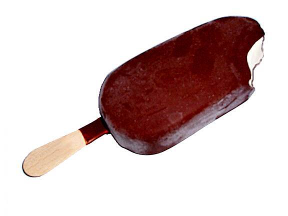 Magnum™ ice cream